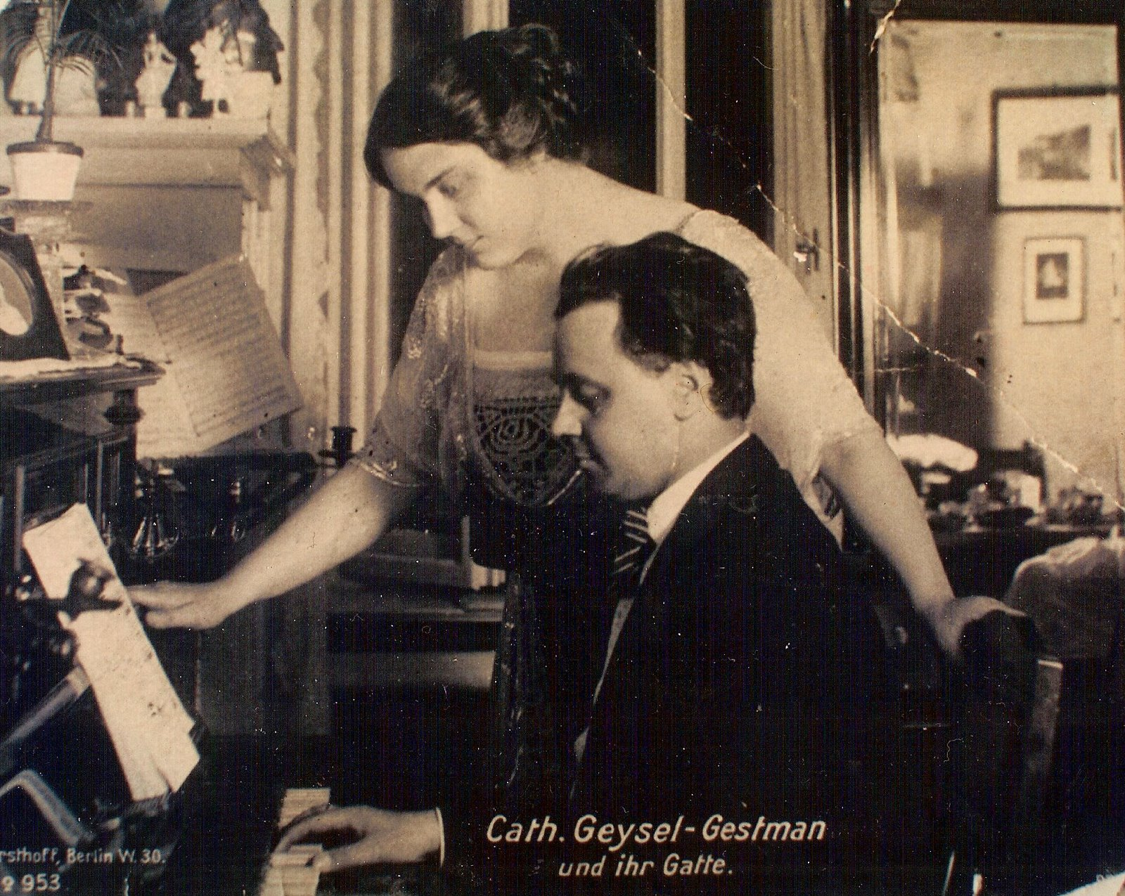 Catherina Gestman en Bernard Geijssel te Berlijn